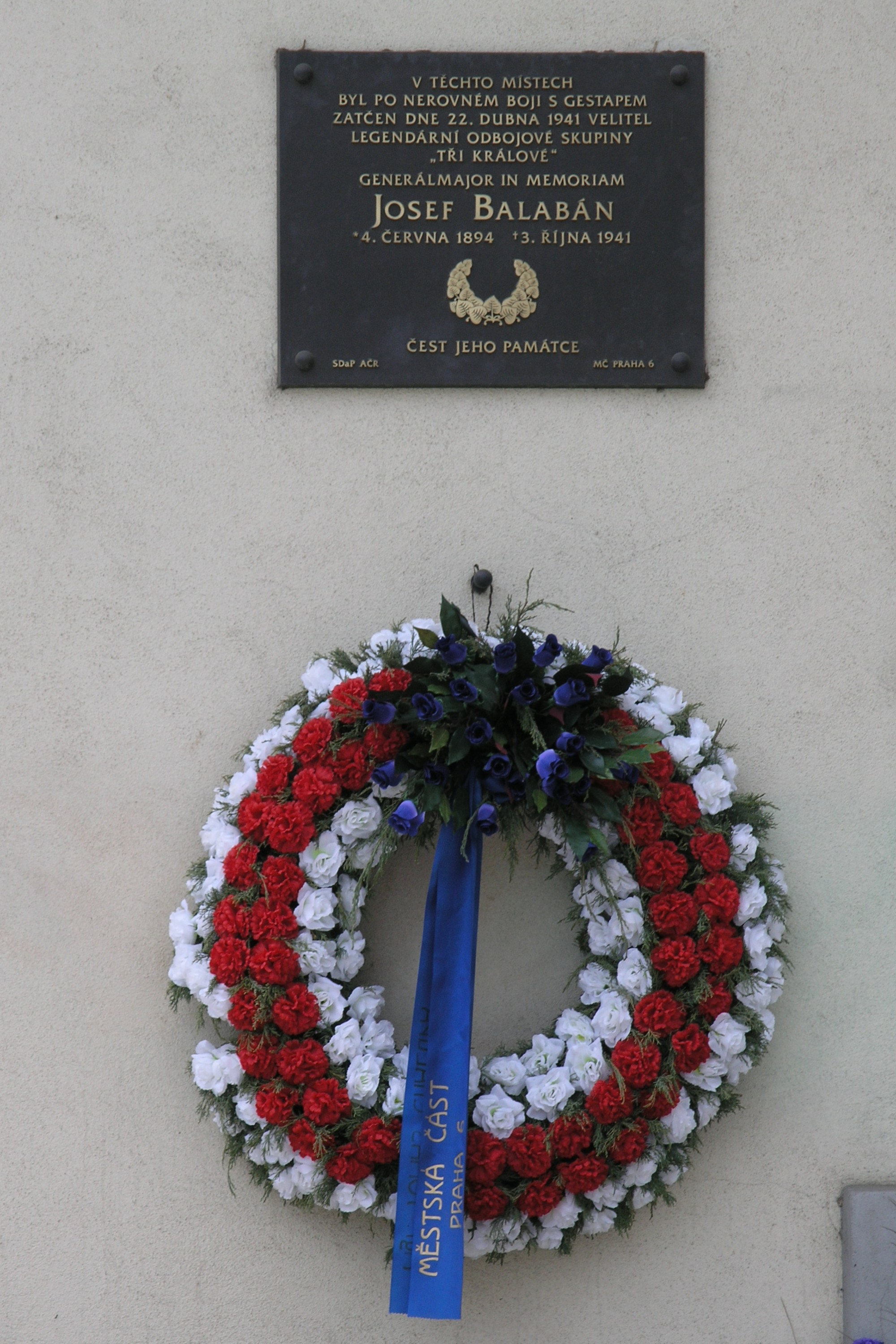 Praha, Dejvice - Pamětní deska Josefa Balabána ve Studentské ulici